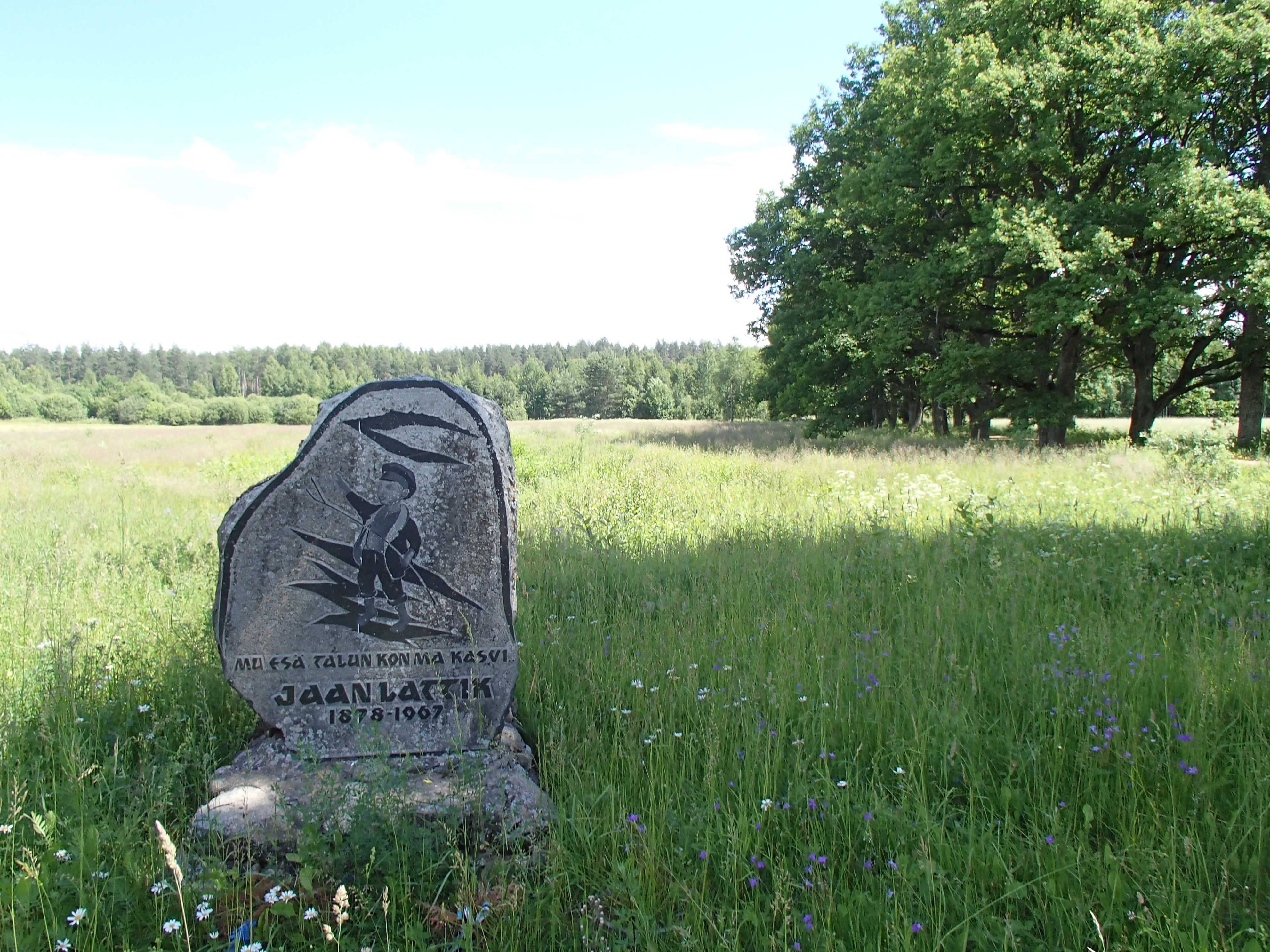 Mälestuskivi Jaan Lattika lapsepõlvekodu juures Koobassaare külas